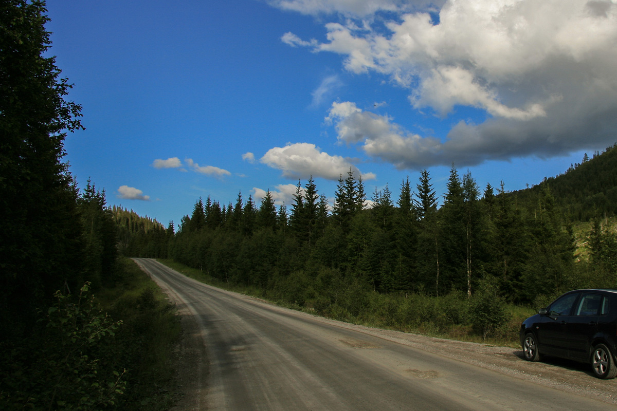 Parti fra Nord-Trøndelags fylkesveg 193 i Mosvik (Inderøy siden 2012).